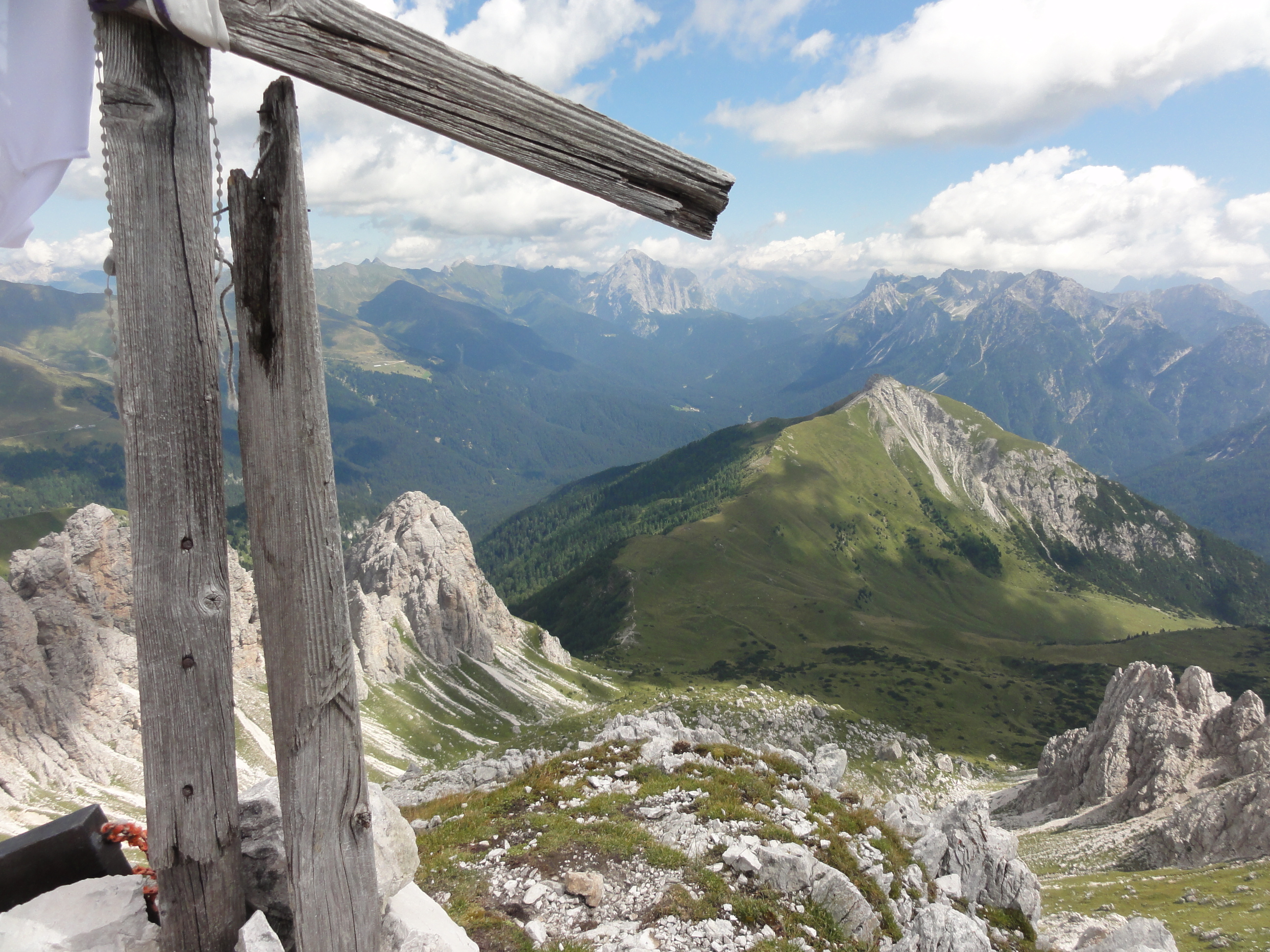 la cima del Longerin